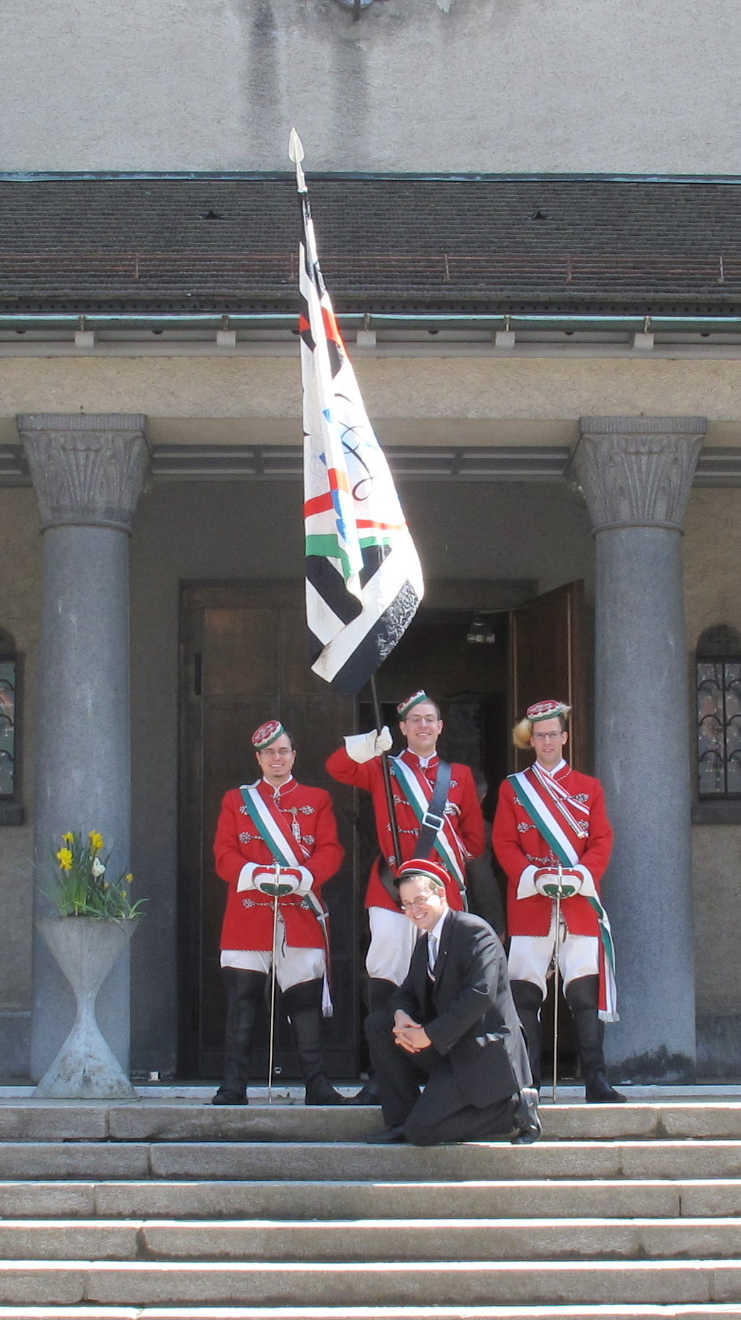 Komitee der AKV Alemannia Sommersemester 2009